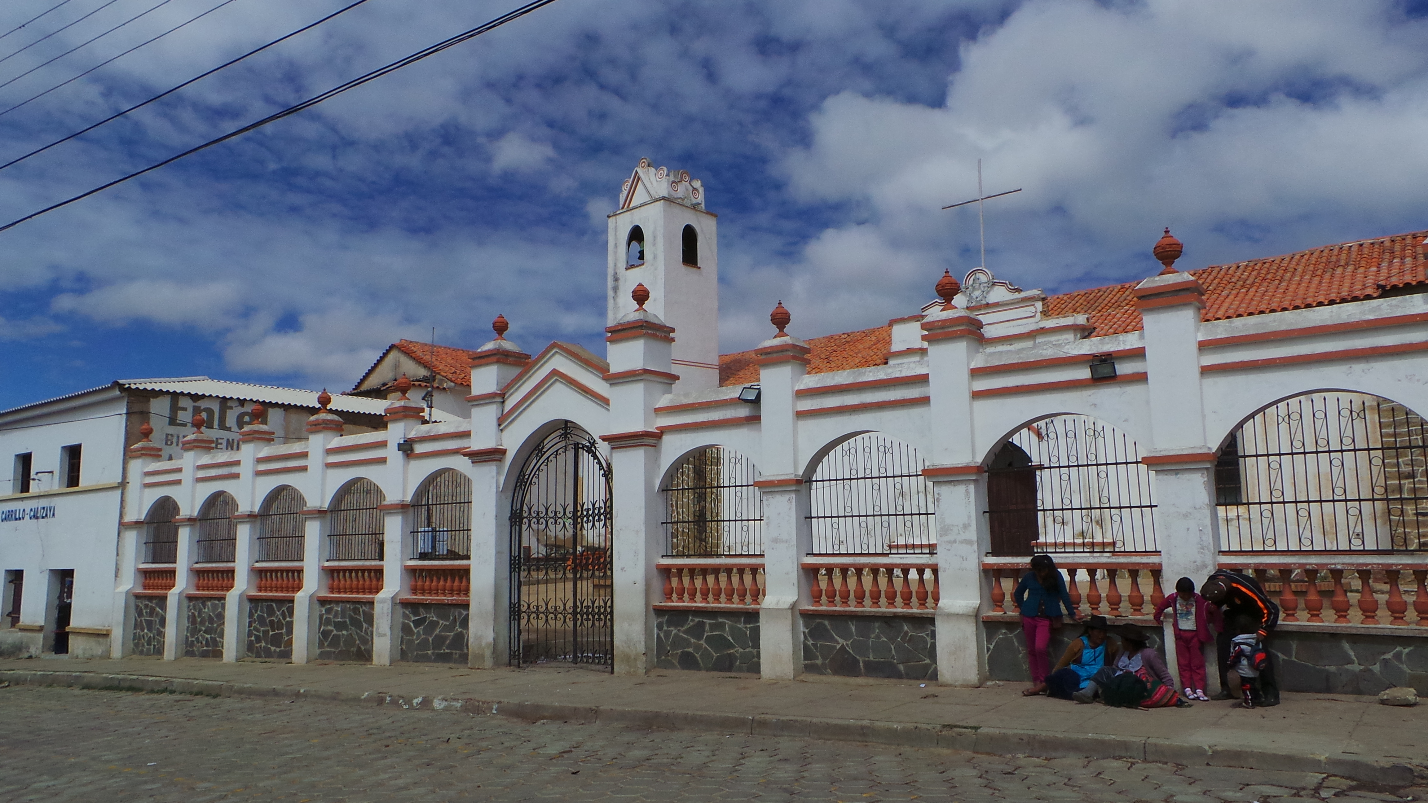 Image de la iglesia de Tarabuco, construida en época colonial y restaurada en 1962